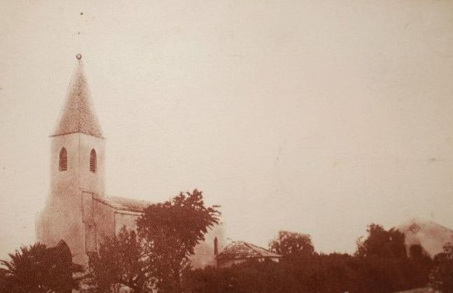 Église de Massicault, aujourd'hui Borj El Amri en Tunisie dans les années 1940